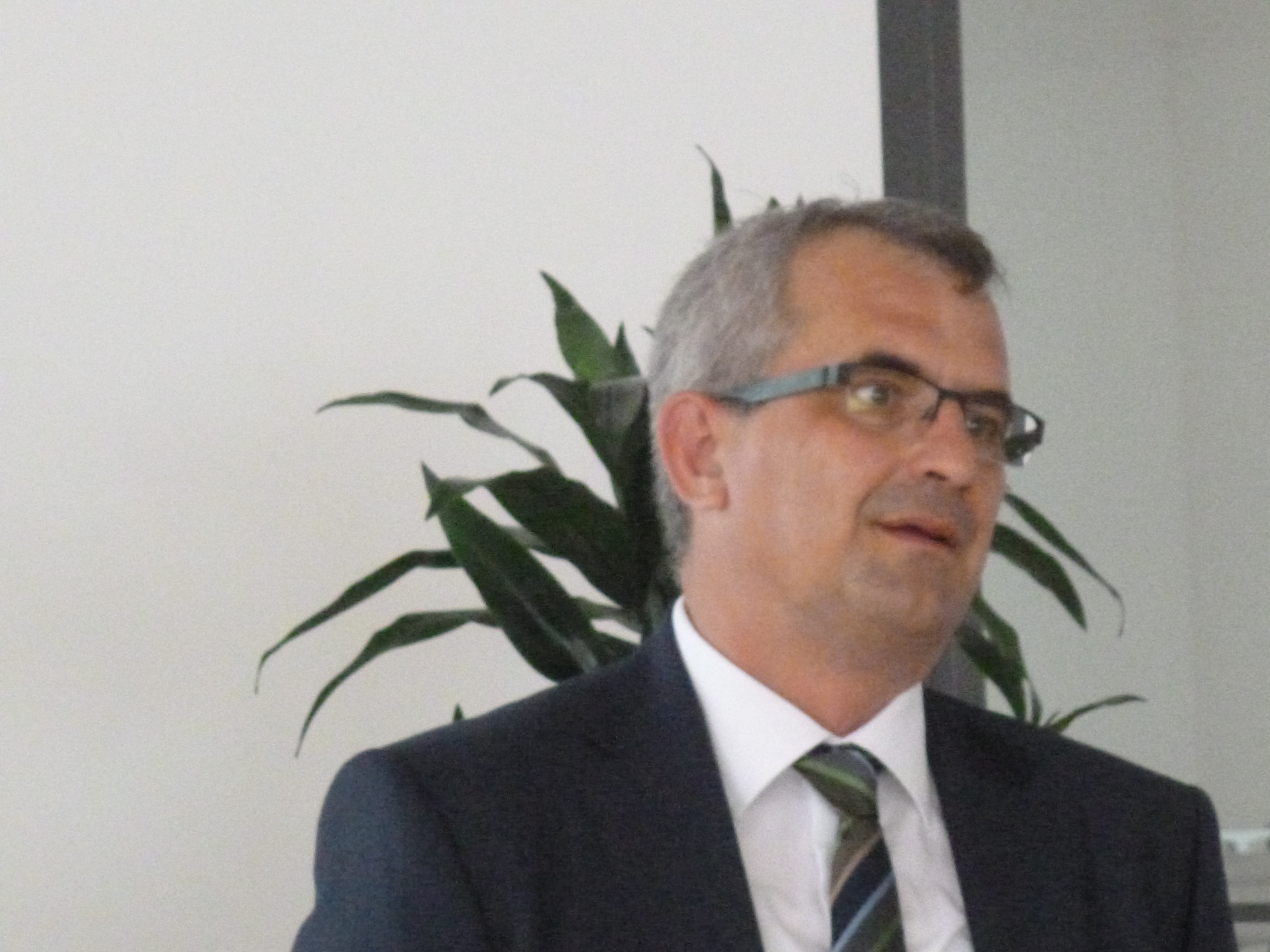 Thomas K. Bauer